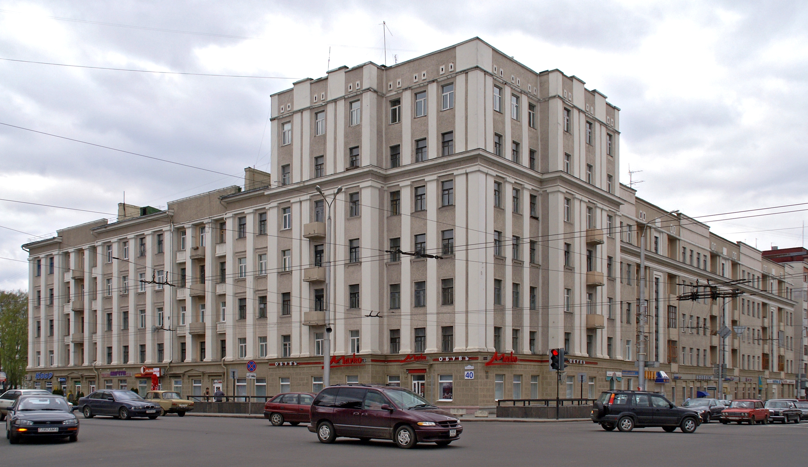 Беларуская (тарашкевіца): Ансамбль плошчы Леніна: Дом Саветаў адміністрацыйны будынак жылыя дамыпомнік У.І. Леніну. г. Магілёў This is a photo of Belarusian heritage monument. Reference number: 513Г000039 ( WLM)